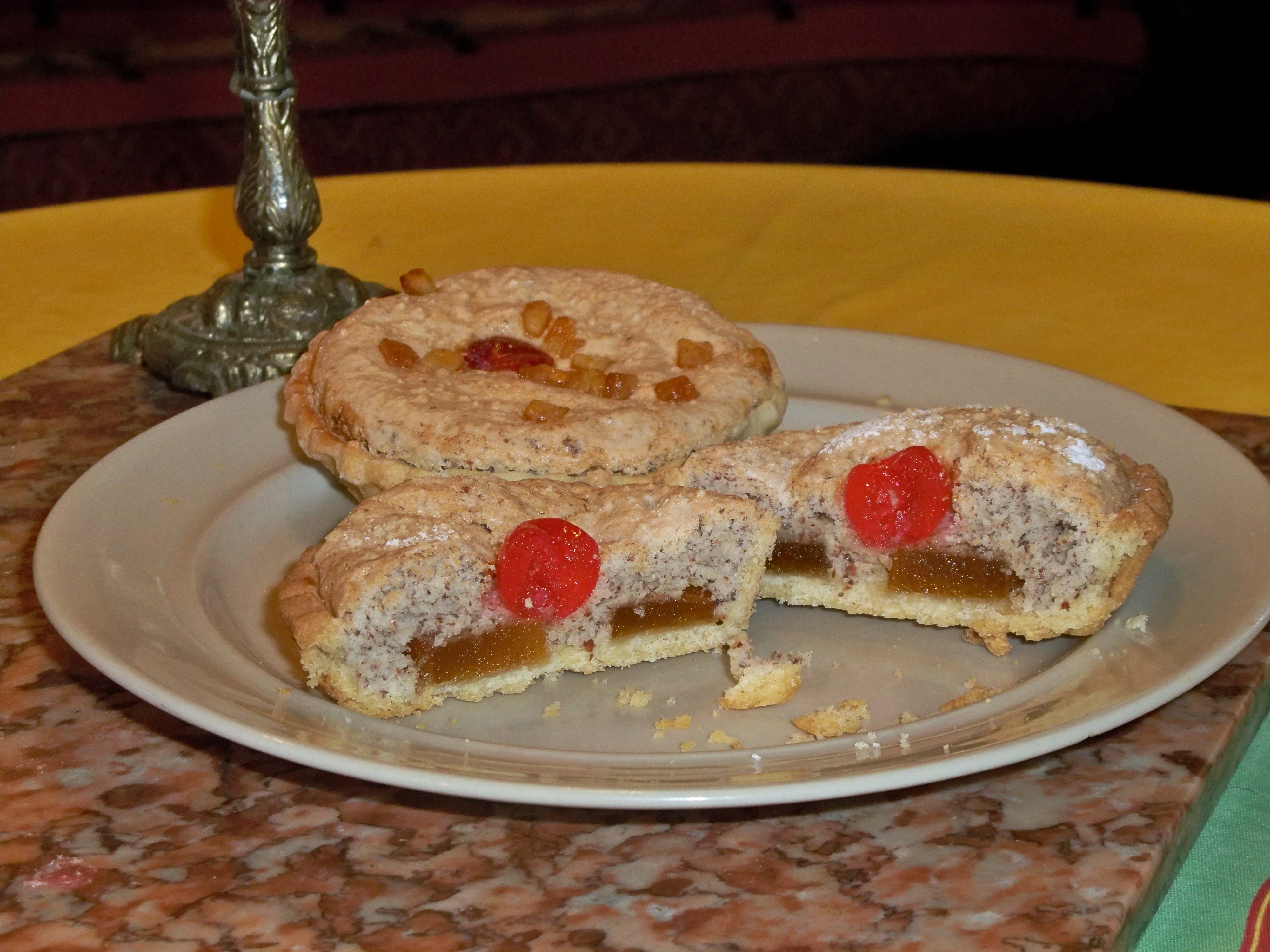 Galapian, gateau aux fruits confits d'Apt (Vaucluse)